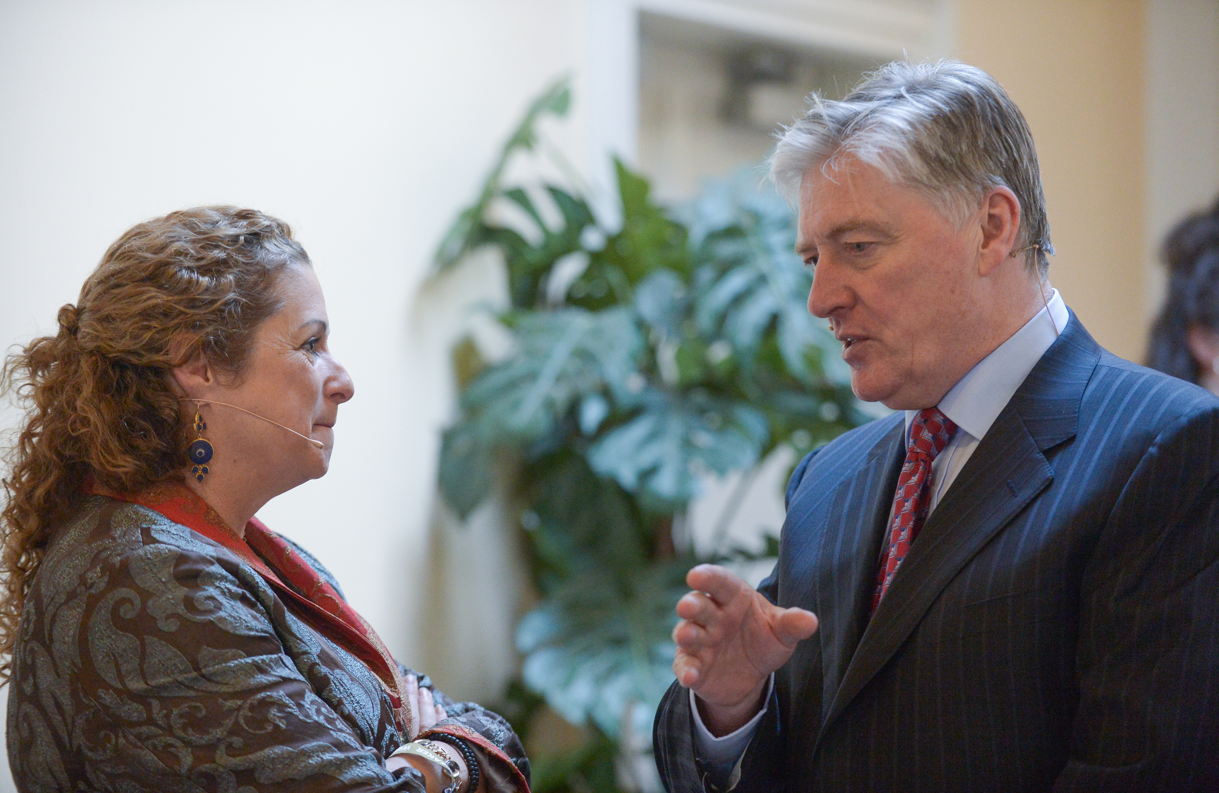 Sportsfile (Web Summit)